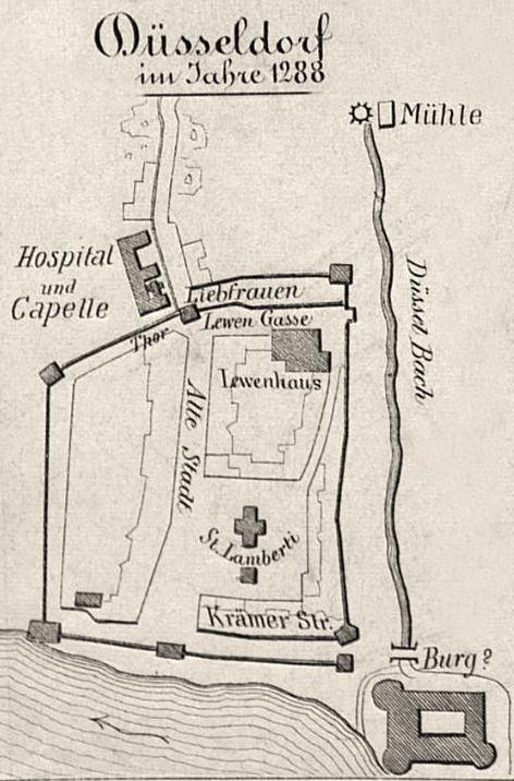 Karte Ausschnitt Düsseldorf im Jahre 1288: Stadt Mühle an der Düssel Burg der Grafen von Berg, Lambertus Kirche (1206 Pfarrkirche, 1288 Stift), Liebfrauenthor im Schnittpunkt der Liefergasse und Ursulinengasse, Liebfrauenkapelle und Hospital